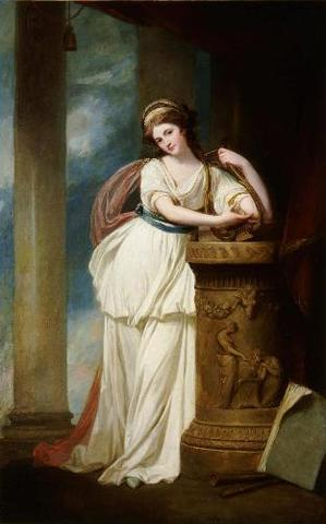 Pyne Crosbie, peinture de George Romney